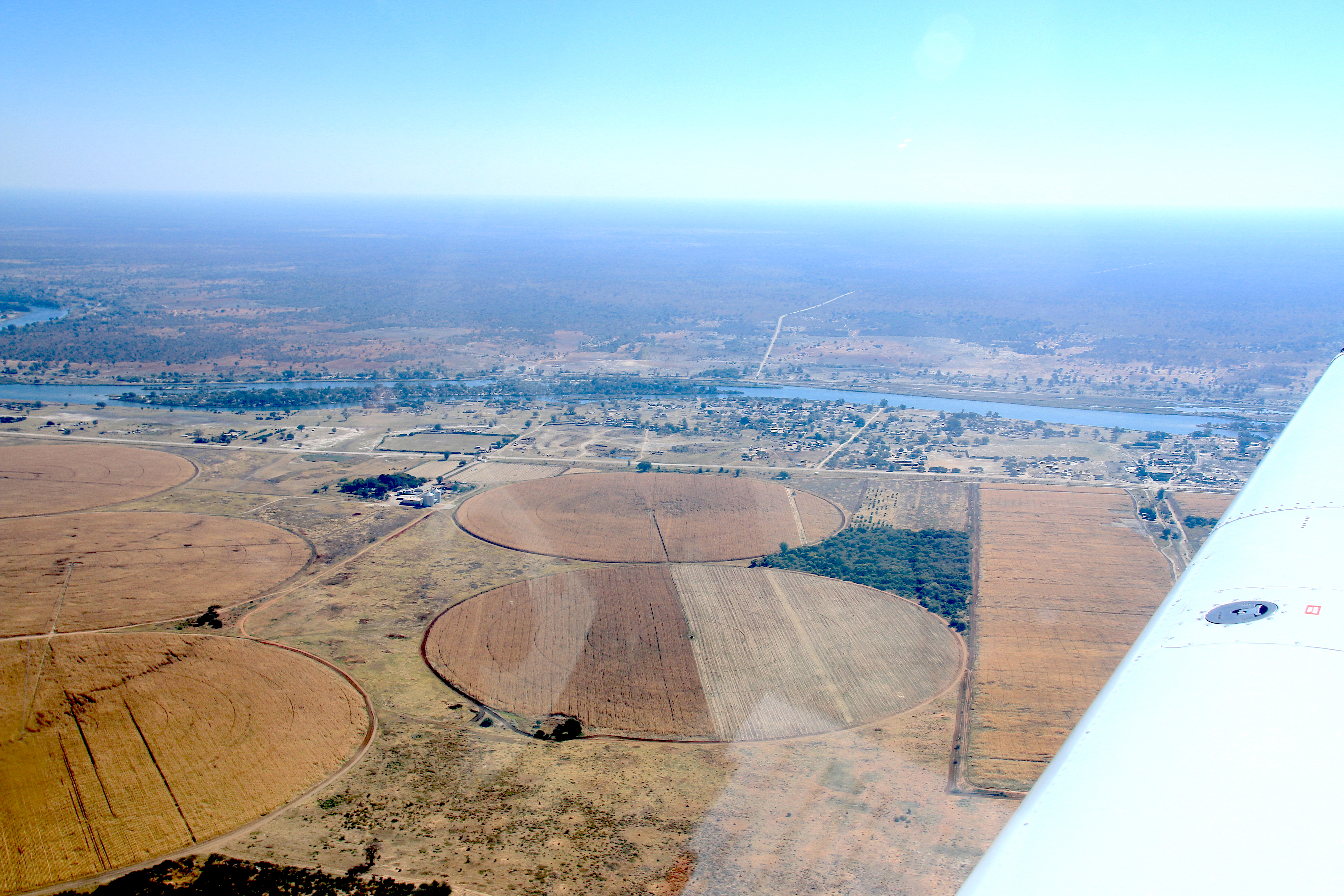 Kapako (2019)